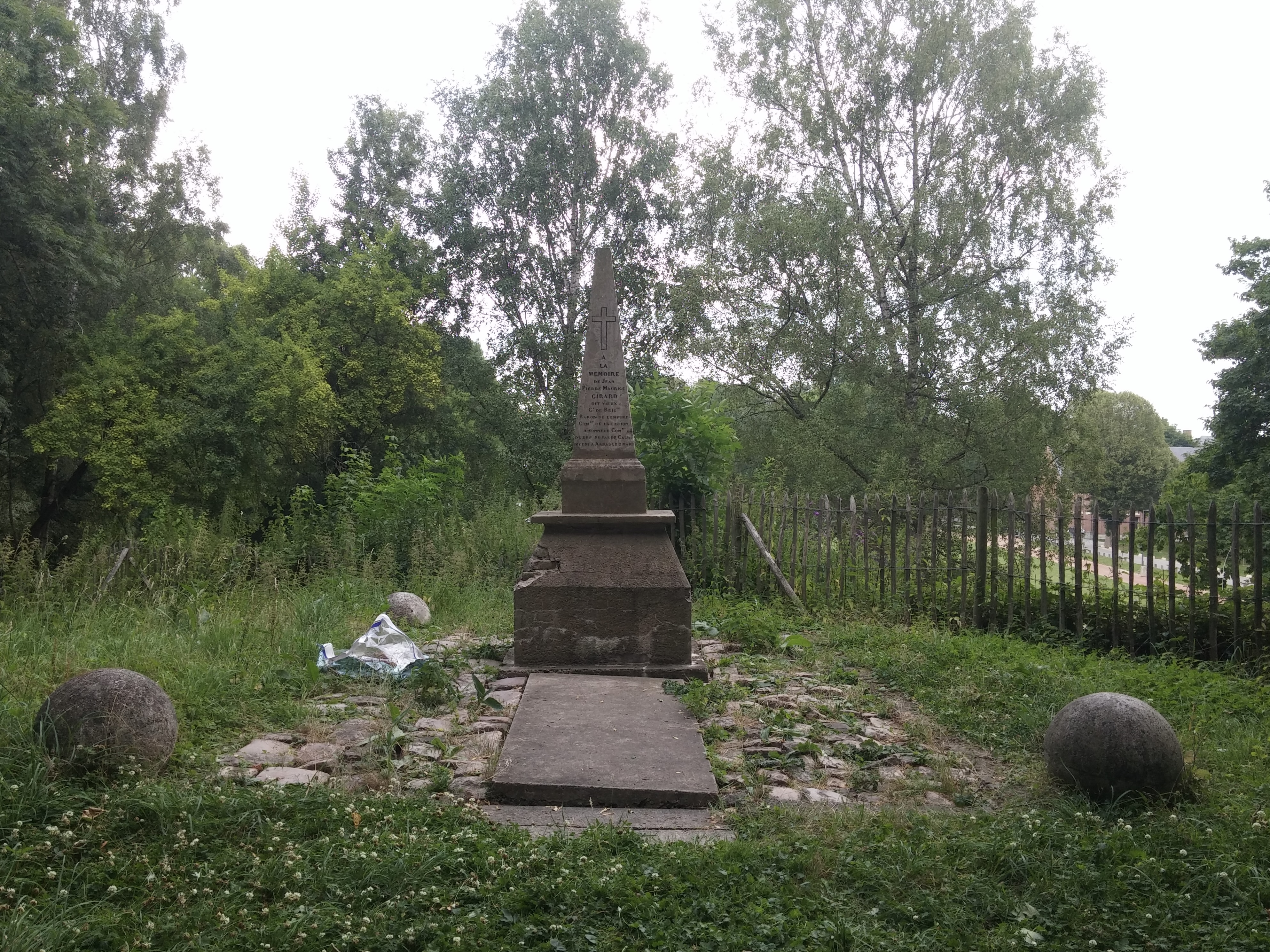 Tombe de Jean Pierre Girard dit Vieux, né Jean-Pierre Mauris Girard dit Guerre, mort le 2 mars 1811 à Arras (Pas-de-Calais).